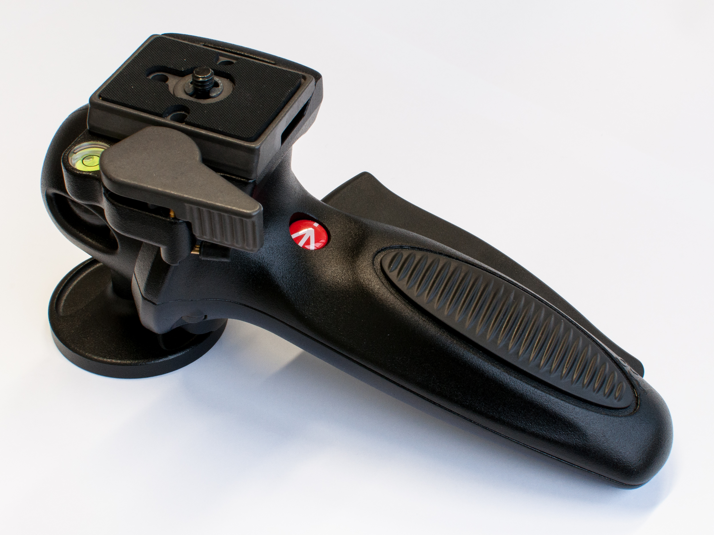 Der Manfrotto Joystick-Stativkopf 327RC2.